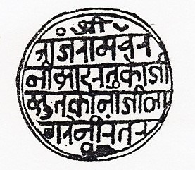 Seal of Kanhoji Angre during Chhatrapati Rajaram era.